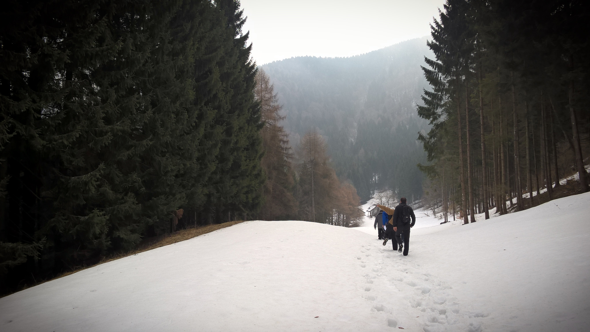 Valmorel, Veneto, Italia